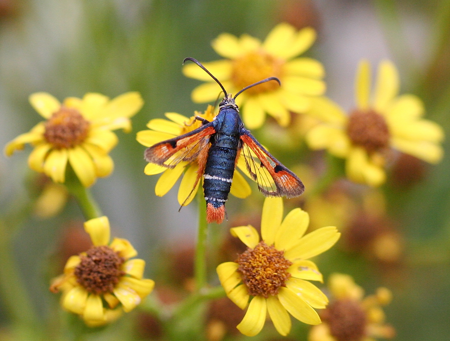 Lepidoptera - Sesiidae - Pyropteron chrysidiforme